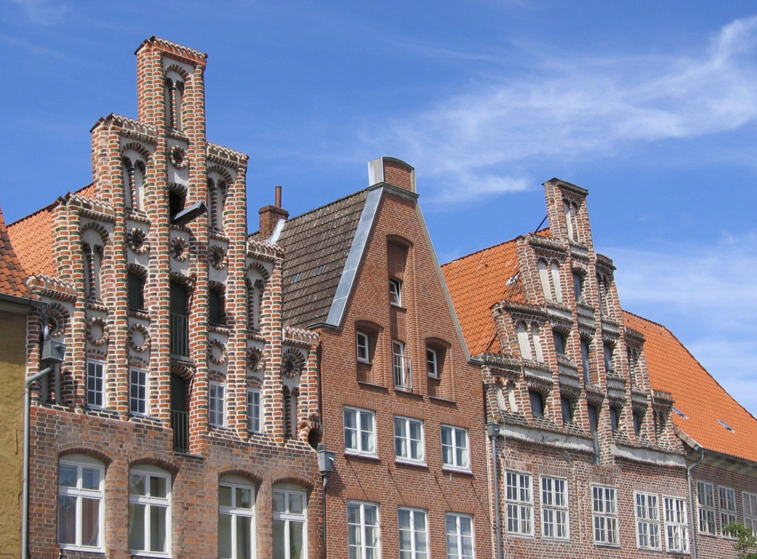 Gebäudefassaden „Am Sande“ in Lüneburg links: Komplex Am Sande 46/47; Vorderhaus Nr. 46 mit Staffelgiebel (heute Edeka) Mitte: Am Sande 45 mit Dreieckgiebel (errichtet 15. Jh., Fassade zuletzt 1965 erneuert) rechts: Komplex Am Sande 43/43a mit Staffelgiebel